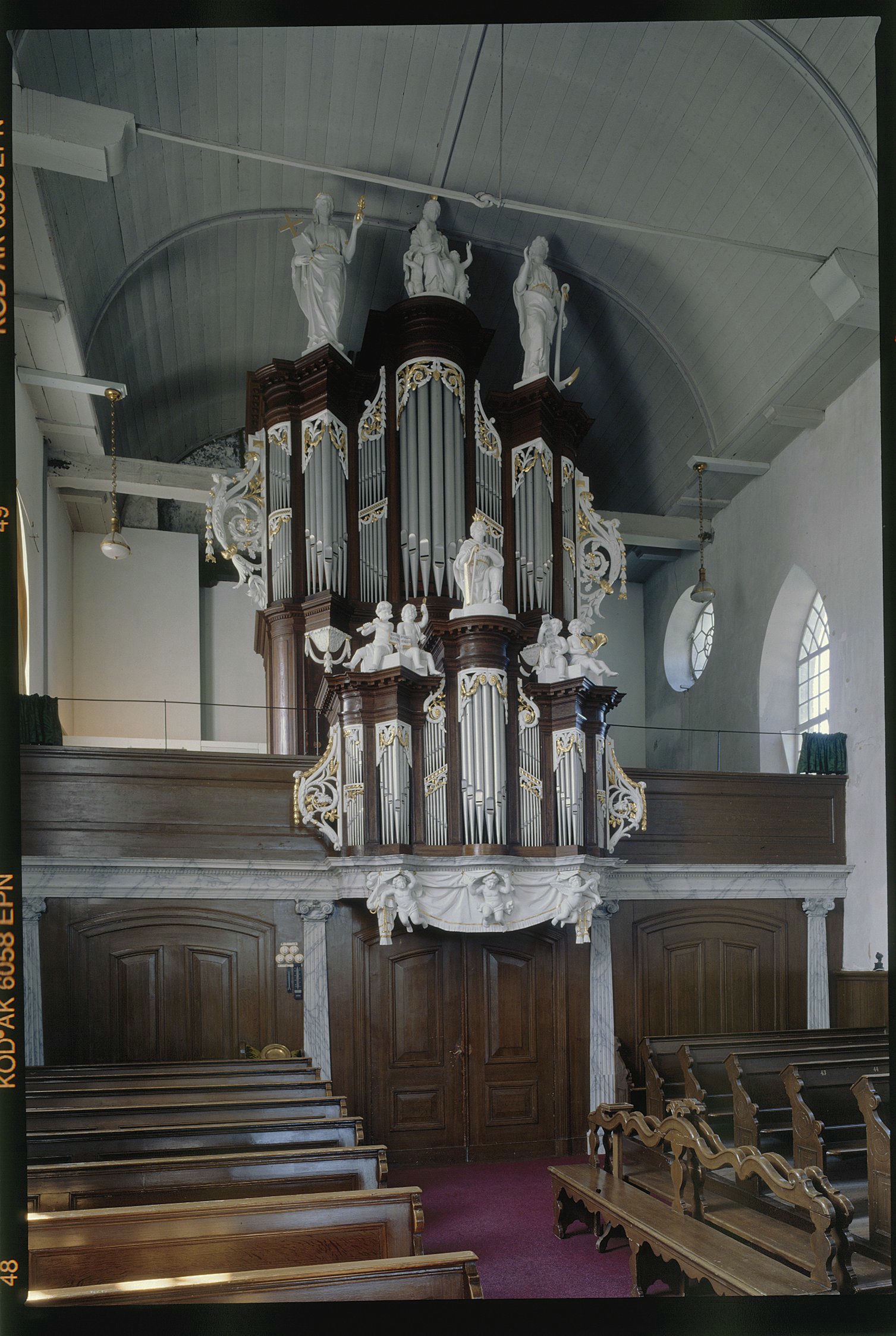 Nederlands Hervormde Kerk: Interieur, aanzicht orgel, orgelnummer 591 (opmerking: Gefotografeerd voor Het Historische Orgel in Nederland 1790-1818)